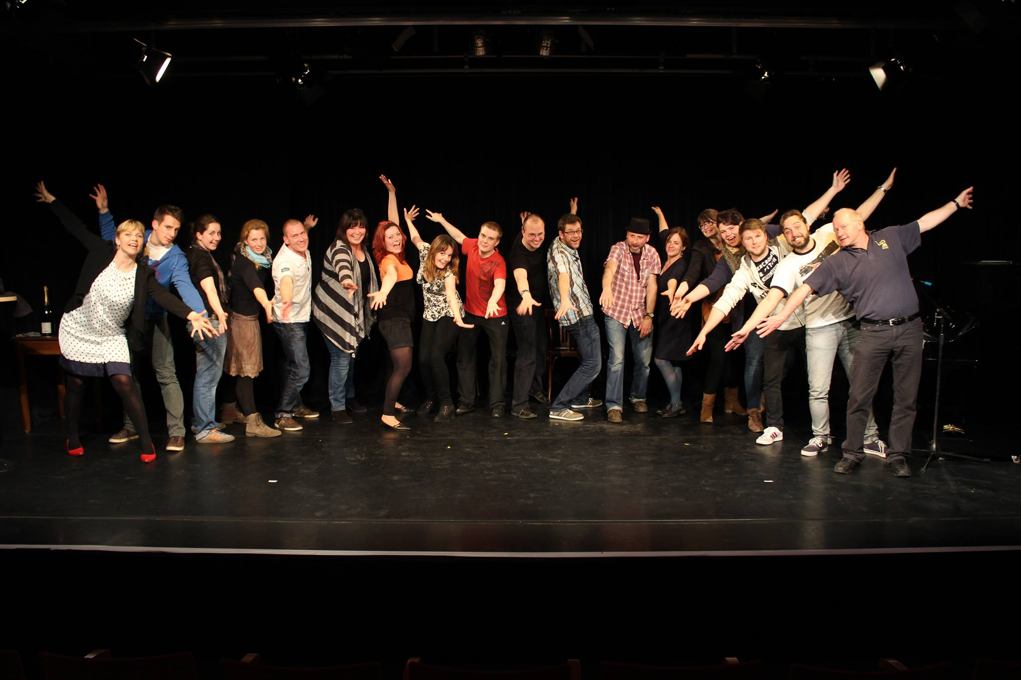 Die "ROhrSTOCK-Familie" wächst und gedeiht!